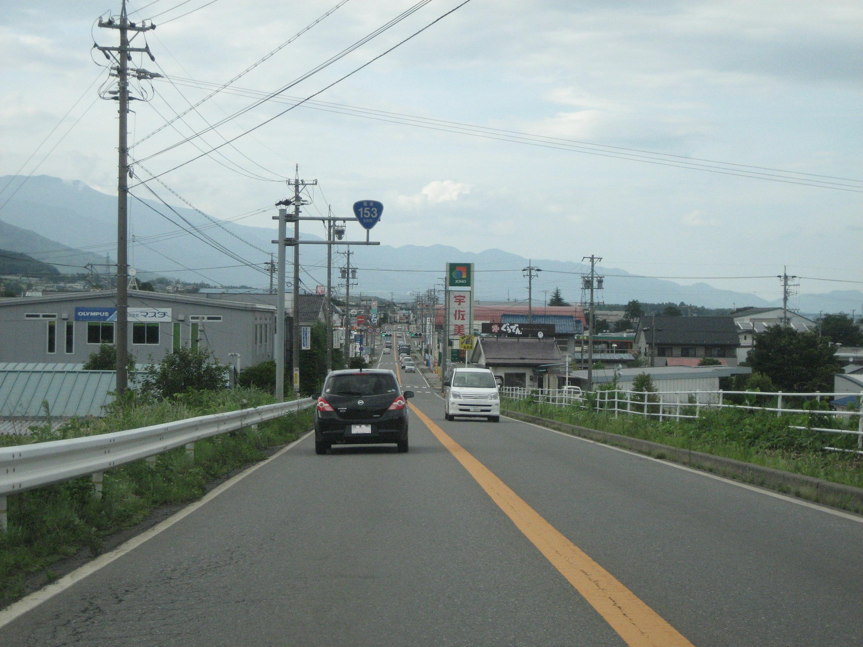 国道153号線長野県伊那市内